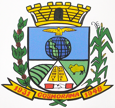 Brasão do Município de Cosmorama, São Paulo, Brasil